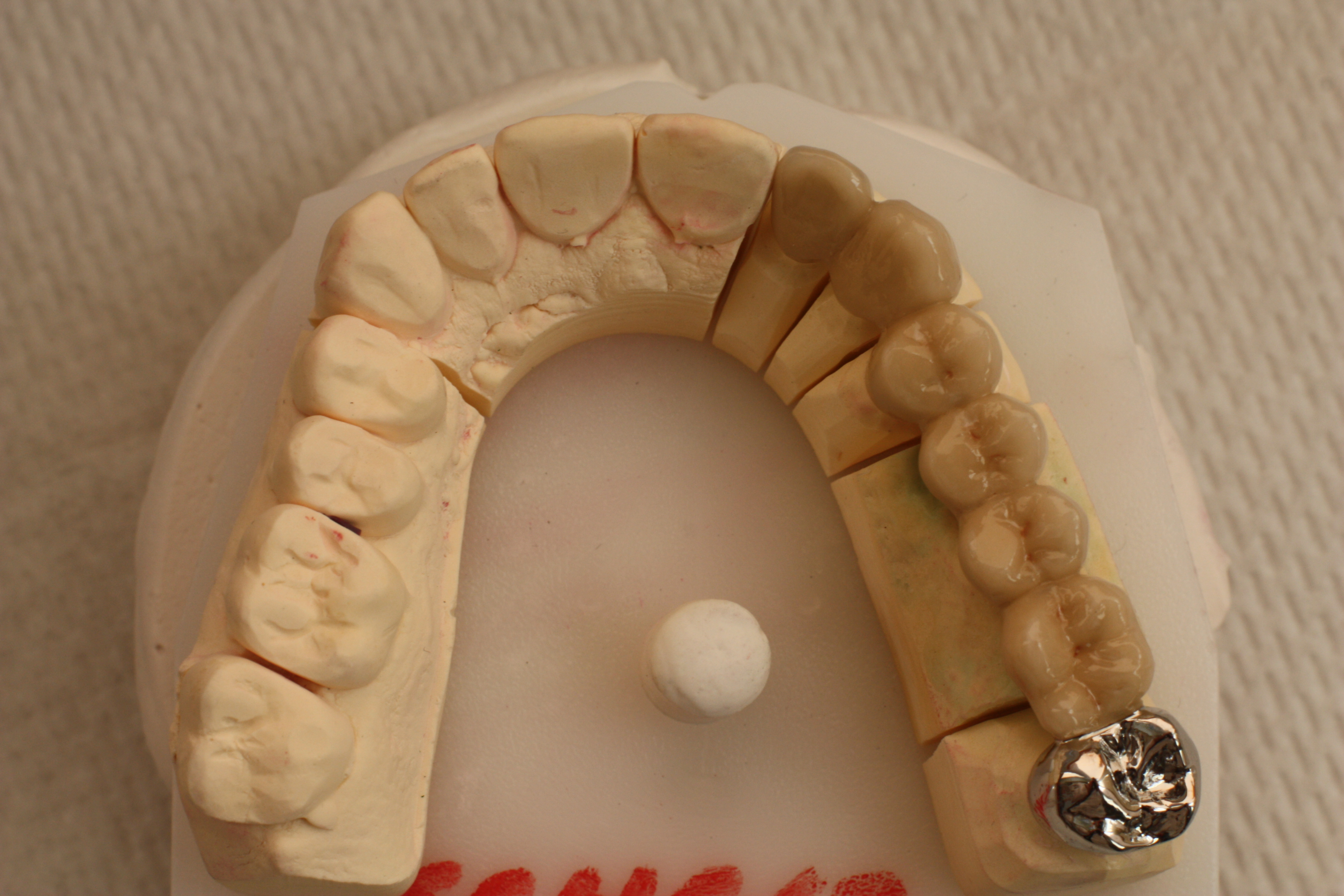 VMK-Brücke, linker Oberkiefer, 7-gliedrig